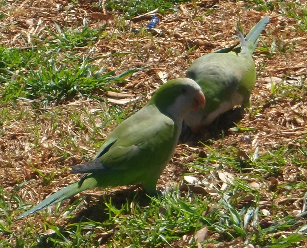 Cotorras argentinas (Myiopsitta monachus) asilvestradas alimentándose en el Parque El Palomar, en Chihuahua, Chihuahua, México.